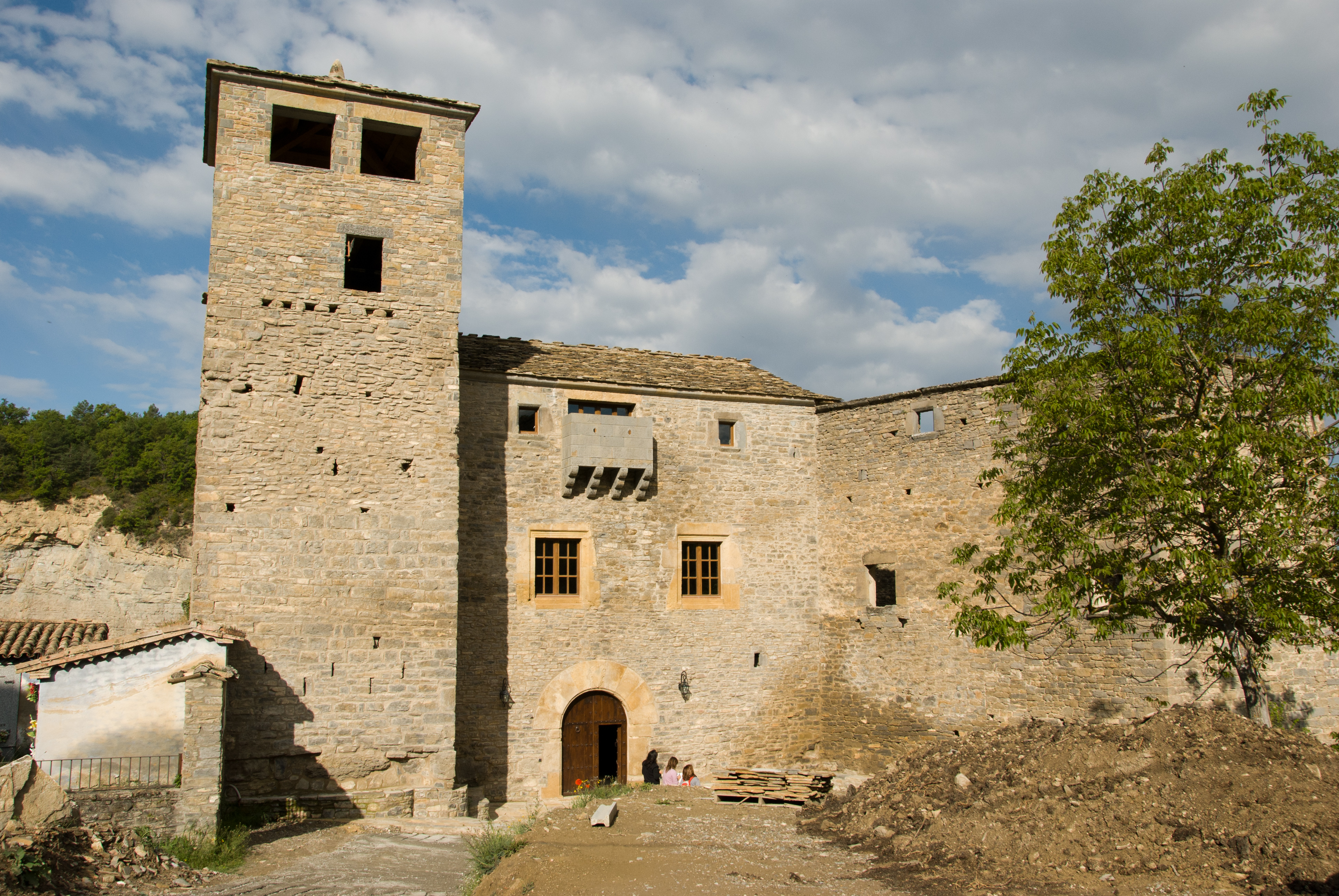 Fachada principal del Palacio de los Mur de Formigales